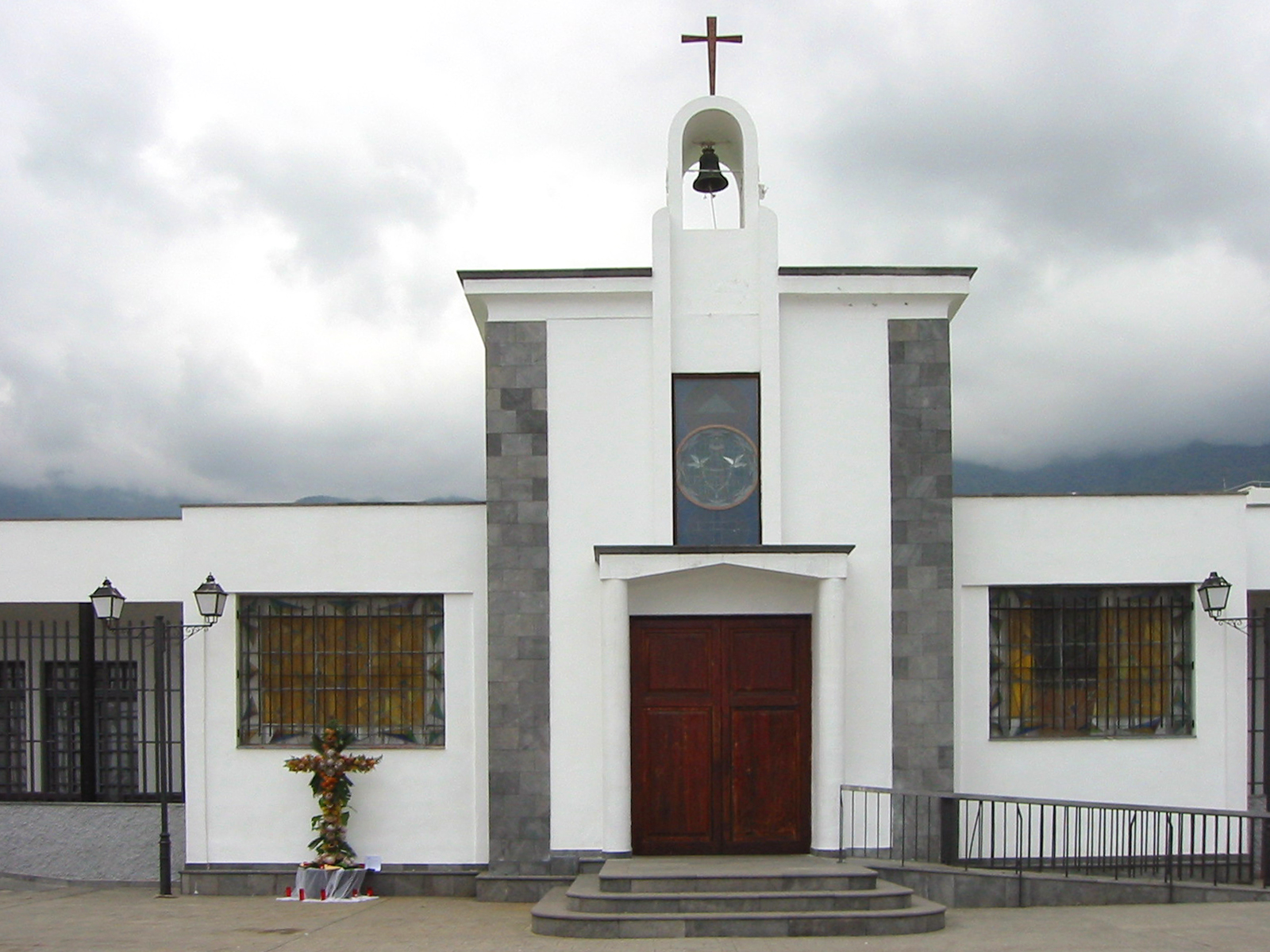 Parroquia de Fátima y Cofradía del Cristo de las Caídas (Güímar, Tenerife, Canarias)